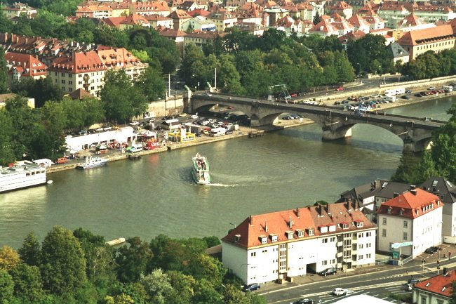 Würzburg Löwenbrücke